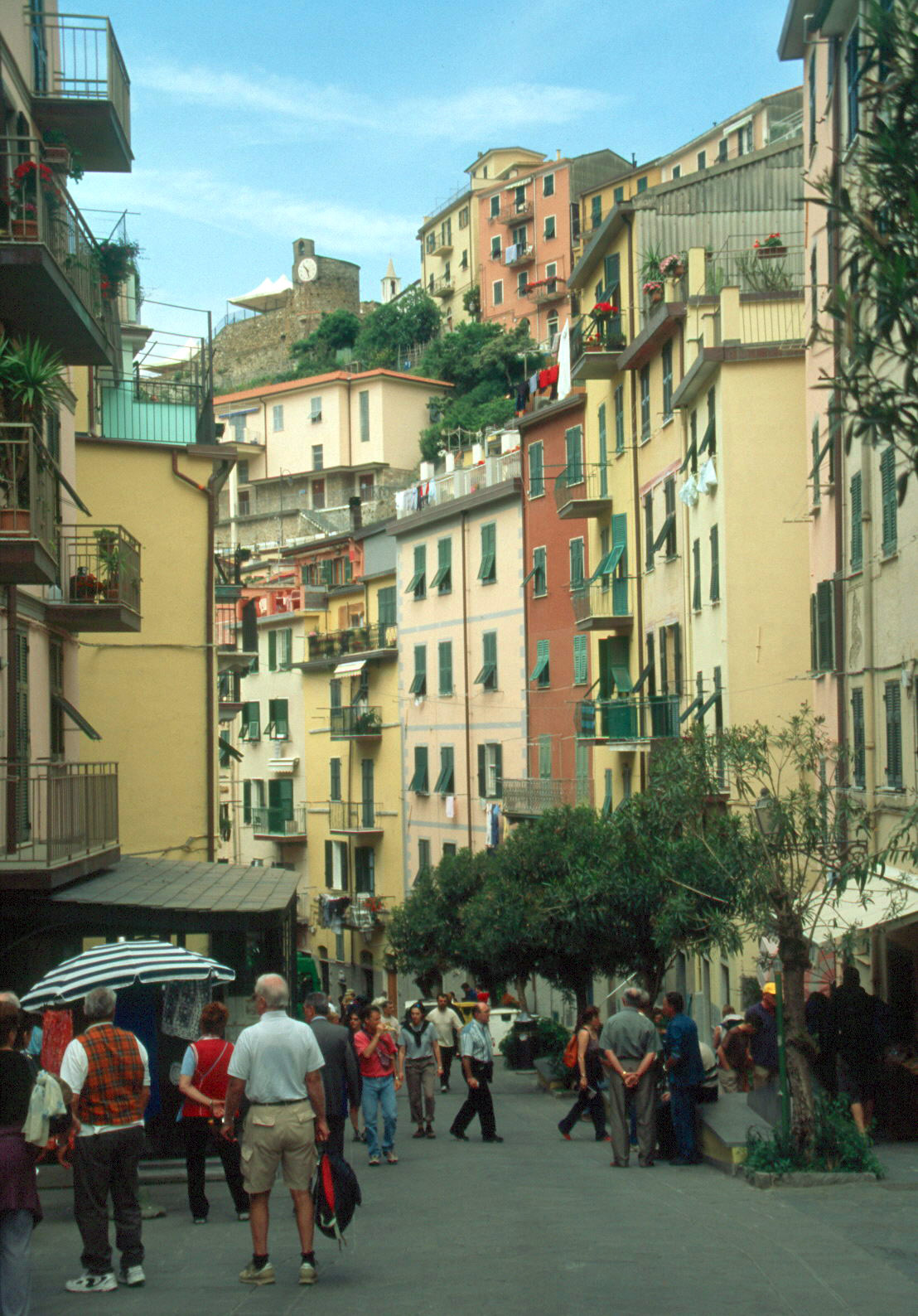 Riomaggiore 2004